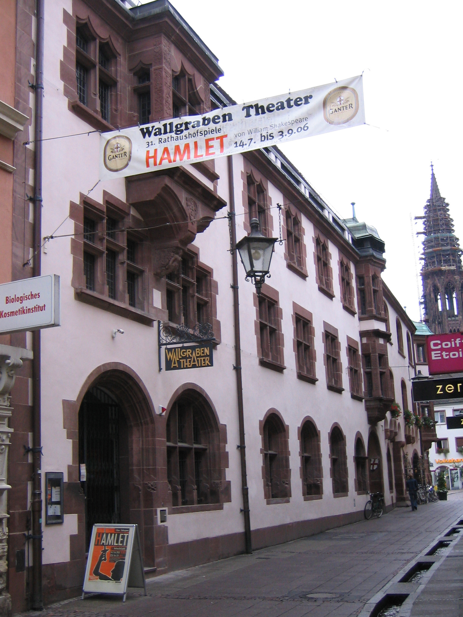 Wallgrabentheater, Freiburg